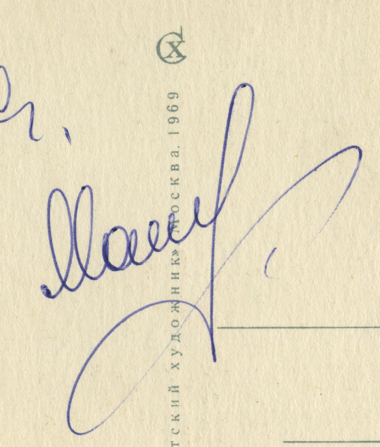 Автограф советского хоккеиста Александра Мальцева из клуба Динамо Москва.